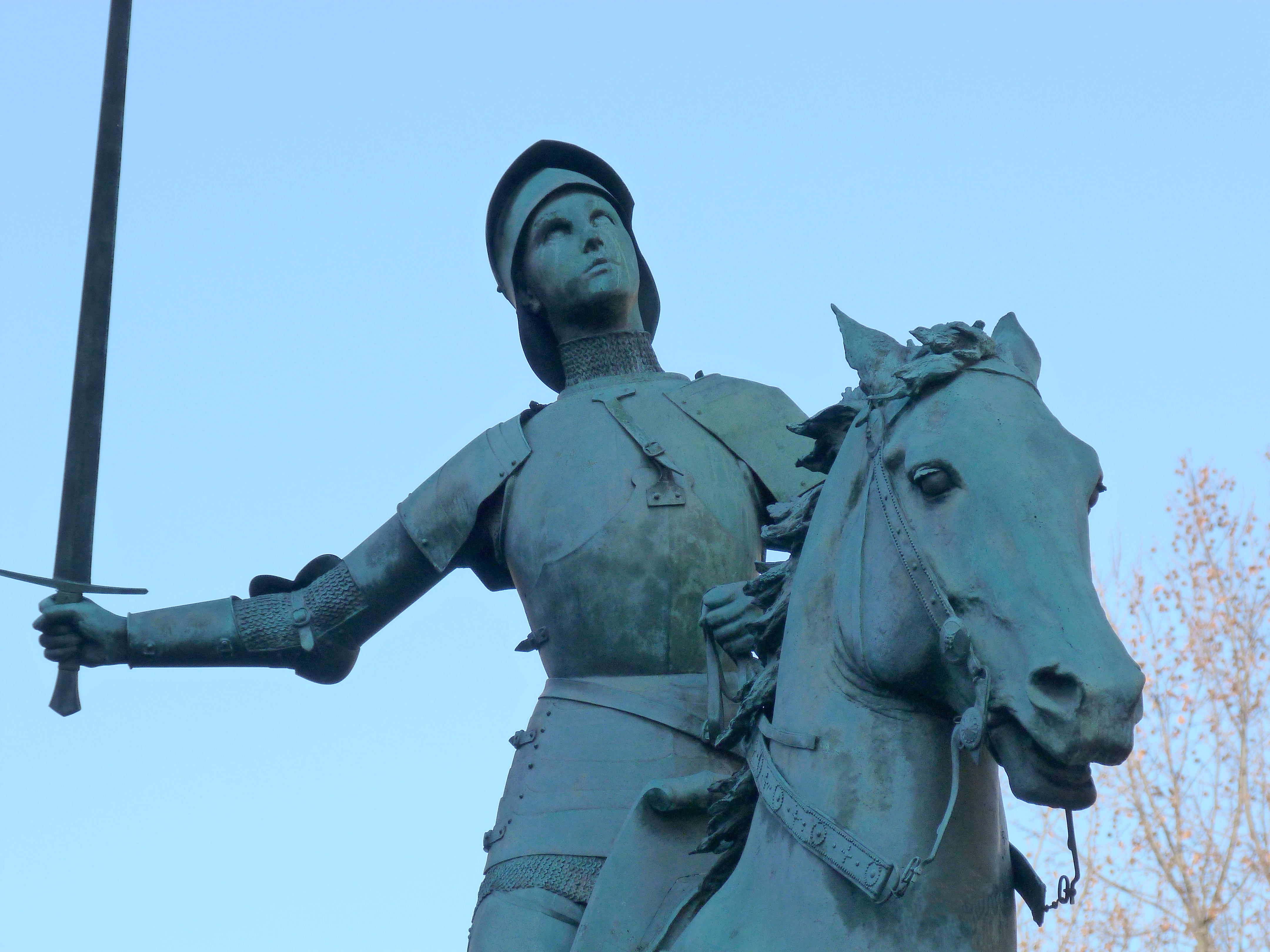 Statue équestre de Jeanne d'Arc (érigée en 1896), par Paul Dubois (1829-1905) sur la place Saint-Augustin à Paris (8e arrond.) - Vue rapprochée (des statues similaires existent à Reims, Strasbourg et Washington).